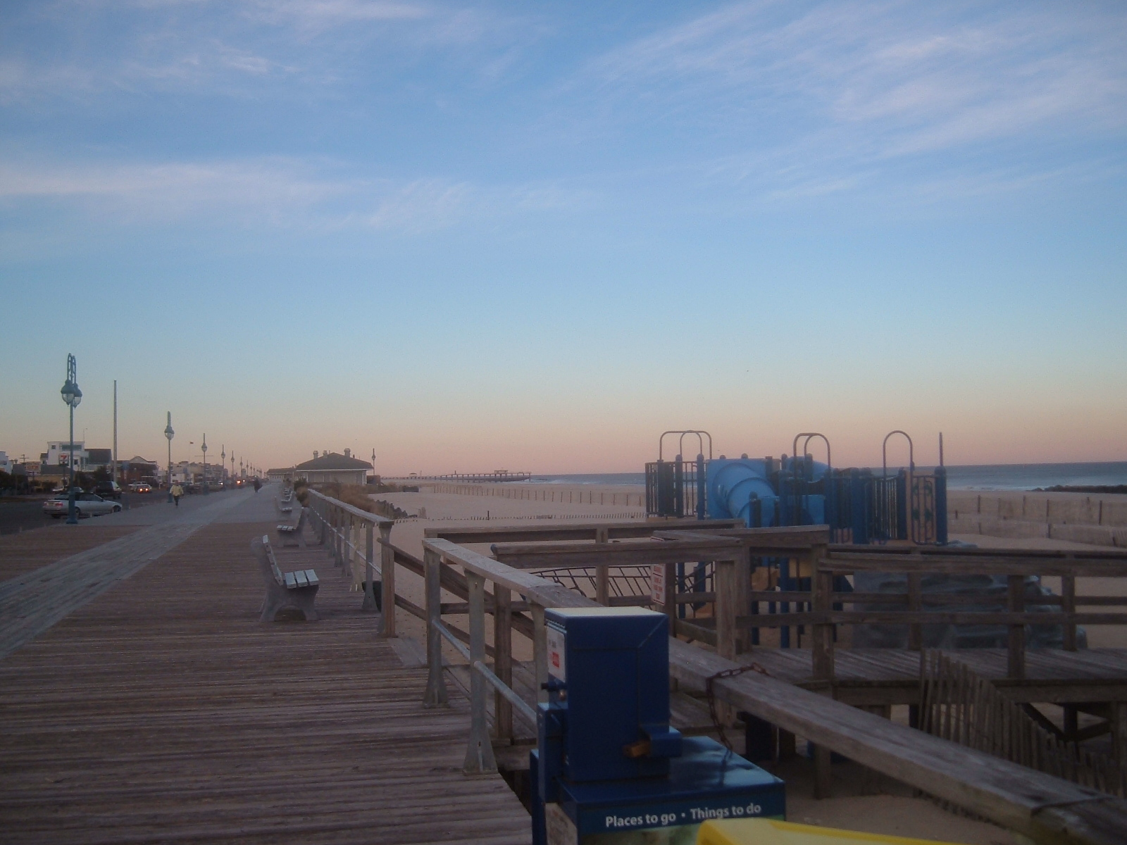 Borgin Belmar sem liggur á ströndinni í ríkinu New Jersey í Bandaríkjunum.